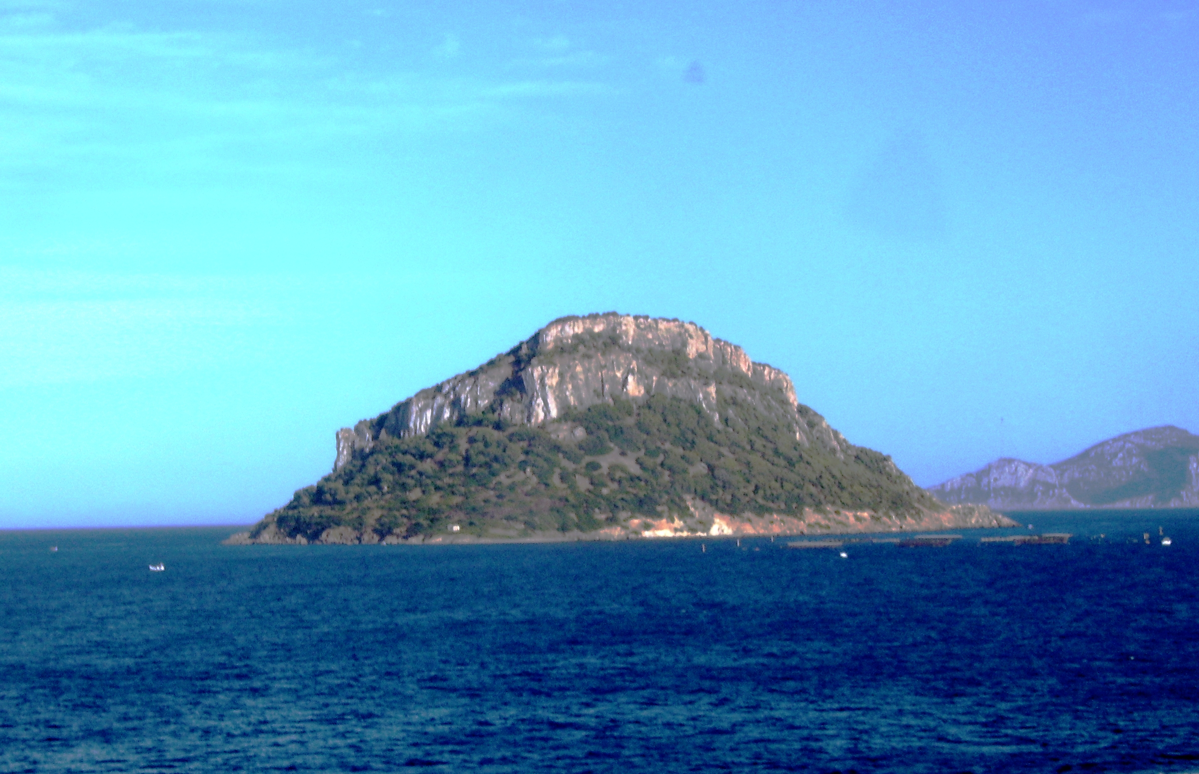 Sardegna - isola di Figarolo --Shardan 02:18, 12 November 2006 (UTC)